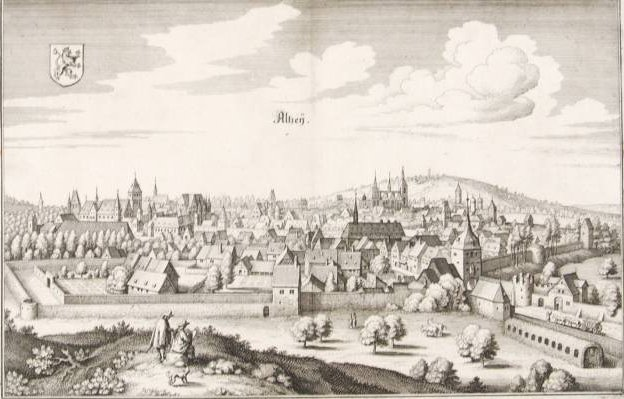 Alzey - Kupferstich nach Matthäus Merian